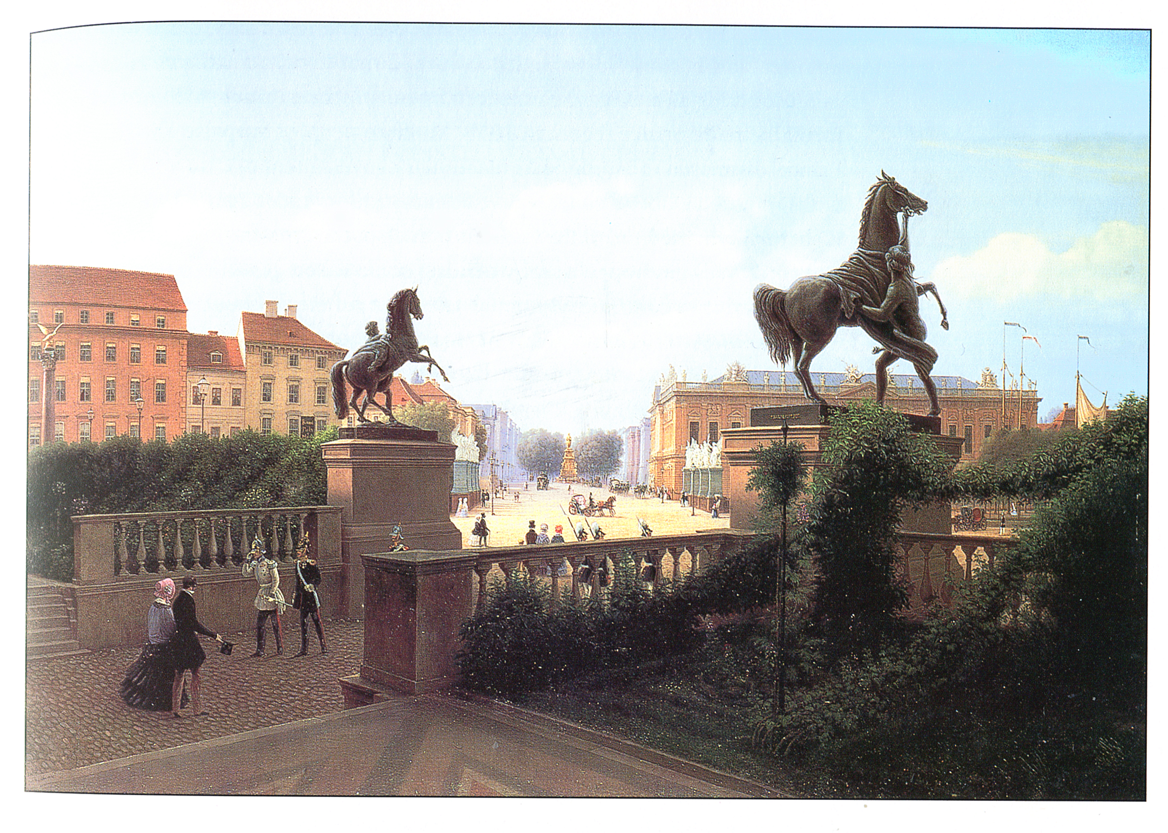 Кони Клодта перед королевским замком в Берлине.